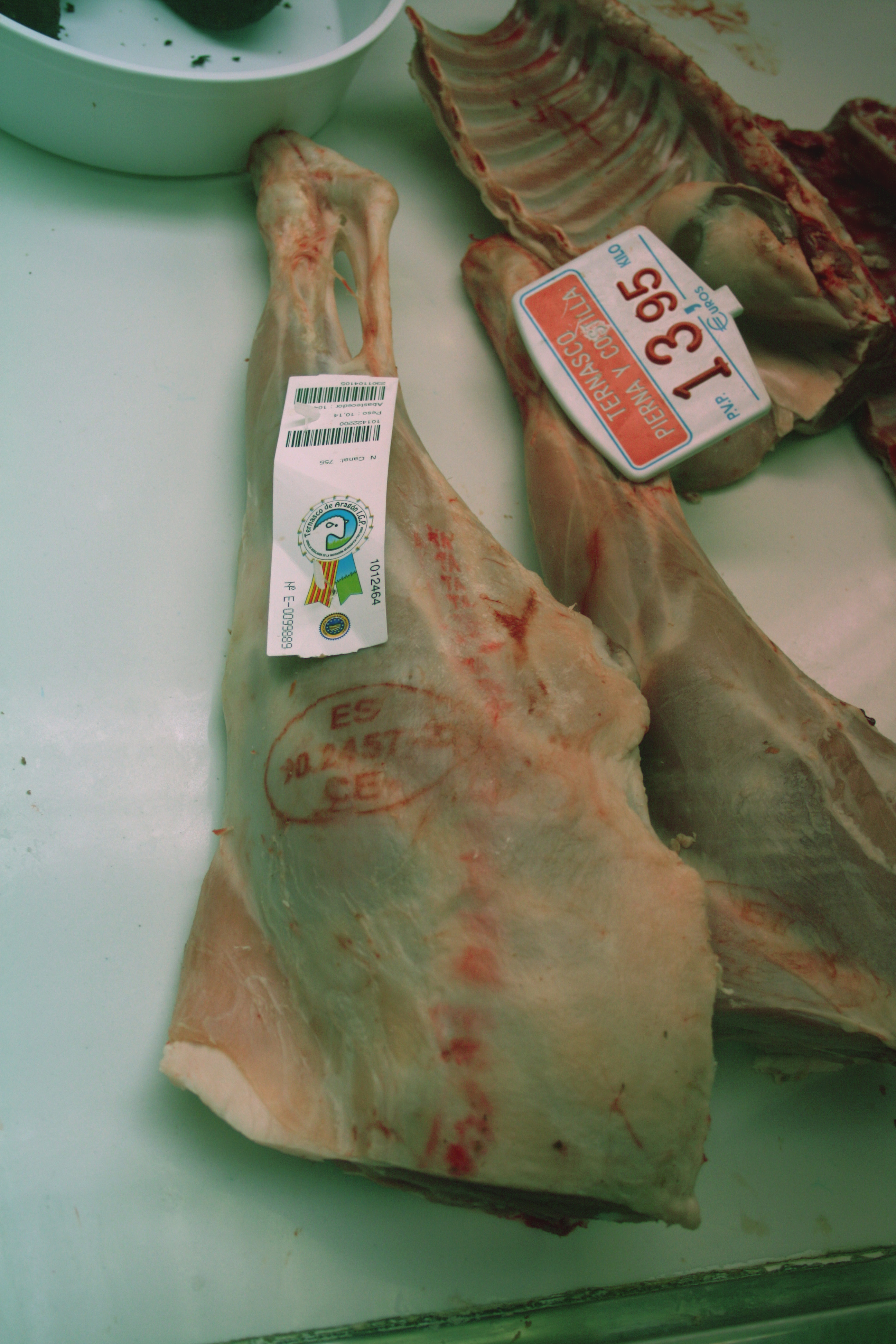 Ternasco de Aragon DO